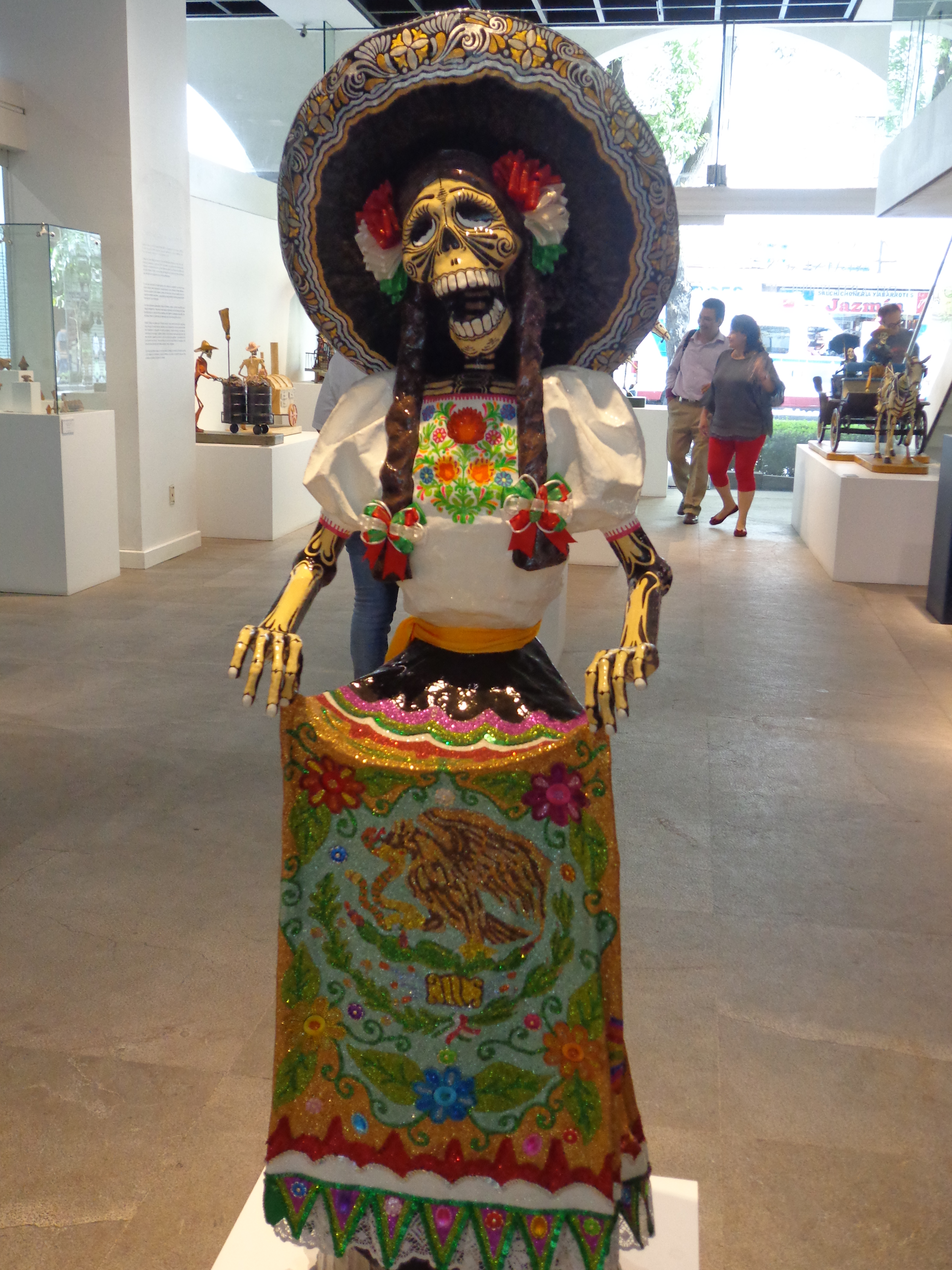 Catrina en el MAP